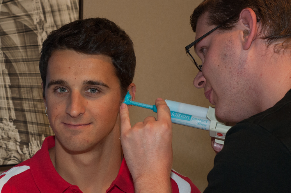 Einkleidung der Österreichischen Teilnehmer an den Olympischen Sommerspielen 2016 am 16./17. Juli 2016 in Wien. Bild zeigt Anfertigung von Ohrstöpseln.